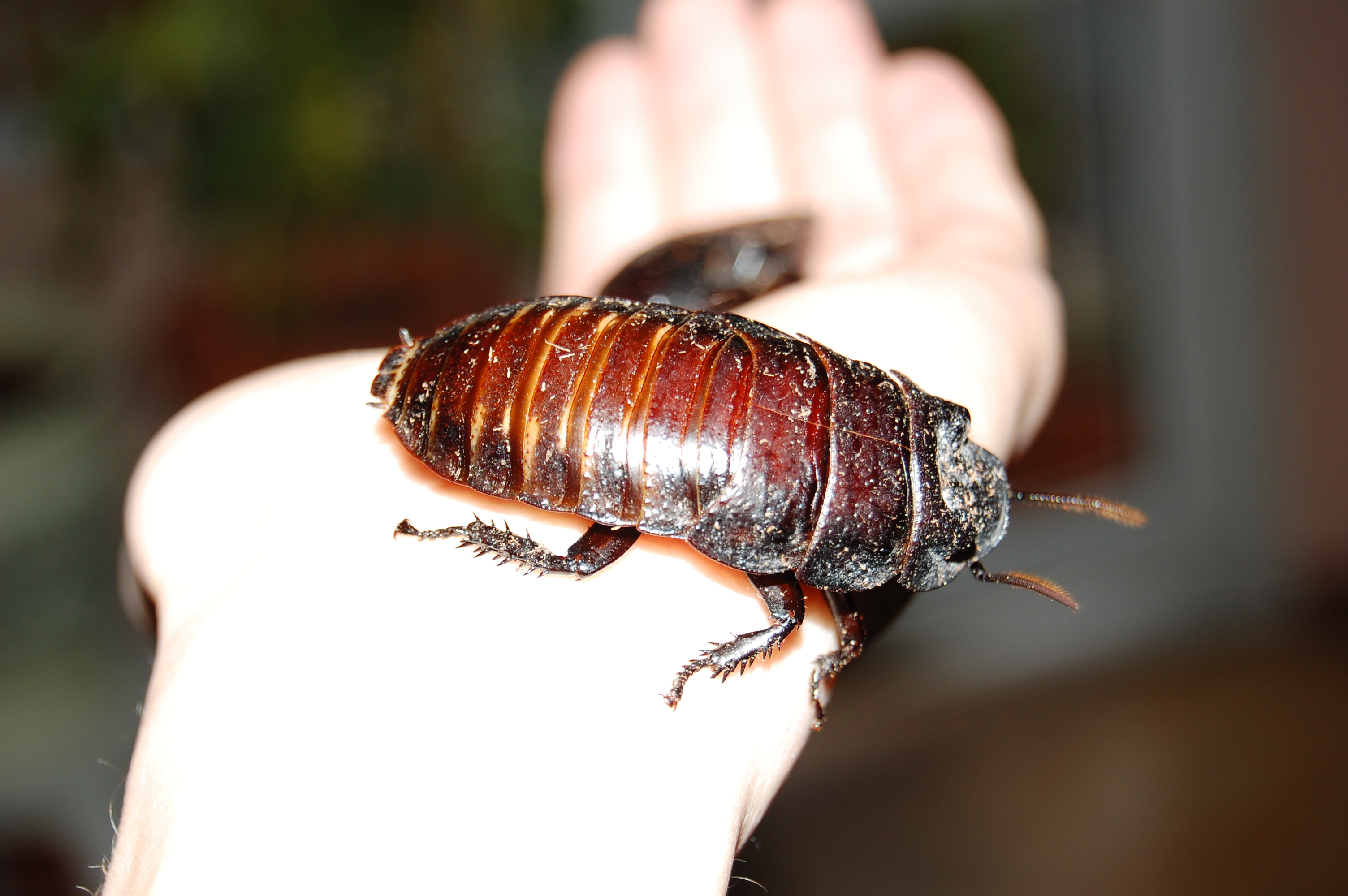 Madagaskaro tarakonas.